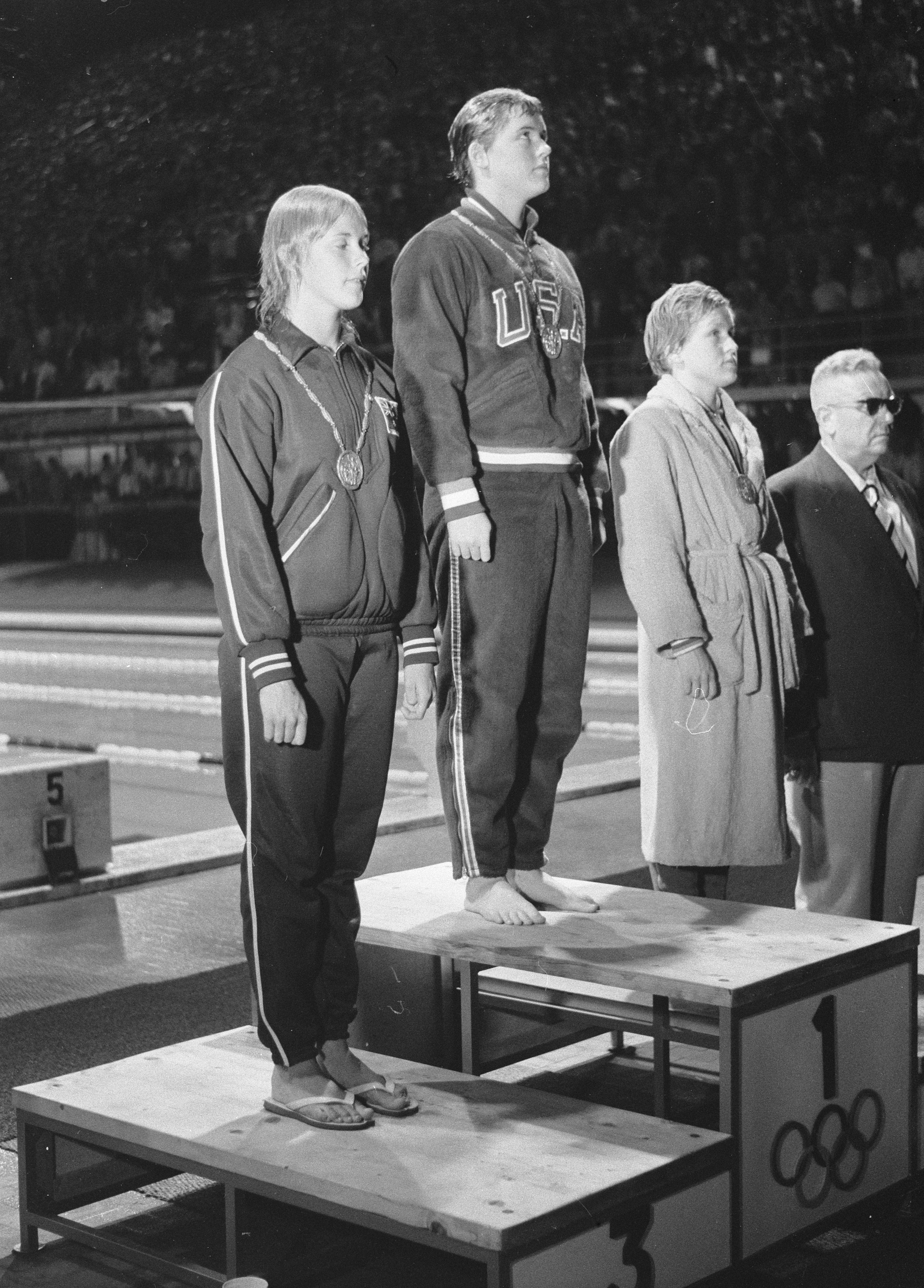 Collectie / Archief : Fotocollectie Anefo Reportage / Serie : [ onbekend ] Beschrijving : Olympische Spelen te Rome, MedaillecCeremonie 100m vlinderslag, nr. 1 Schuler, nr. 2 Heemskerk, 3 Andrew Datum : 11 september 1960 Locatie : Italië, Rome Trefwoorden : sport, zwemmen Persoonsnaam : Andrew, Heemskerk Marianne Fotograaf : Pot, Harry / Anefo Auteursrechthebbende : Nationaal Archief Materiaalsoort : Negatief (zwart/wit) Nummer archiefinventaris : bekijk toegang 2.24.01.05 Bestanddeelnummer : 911-5841